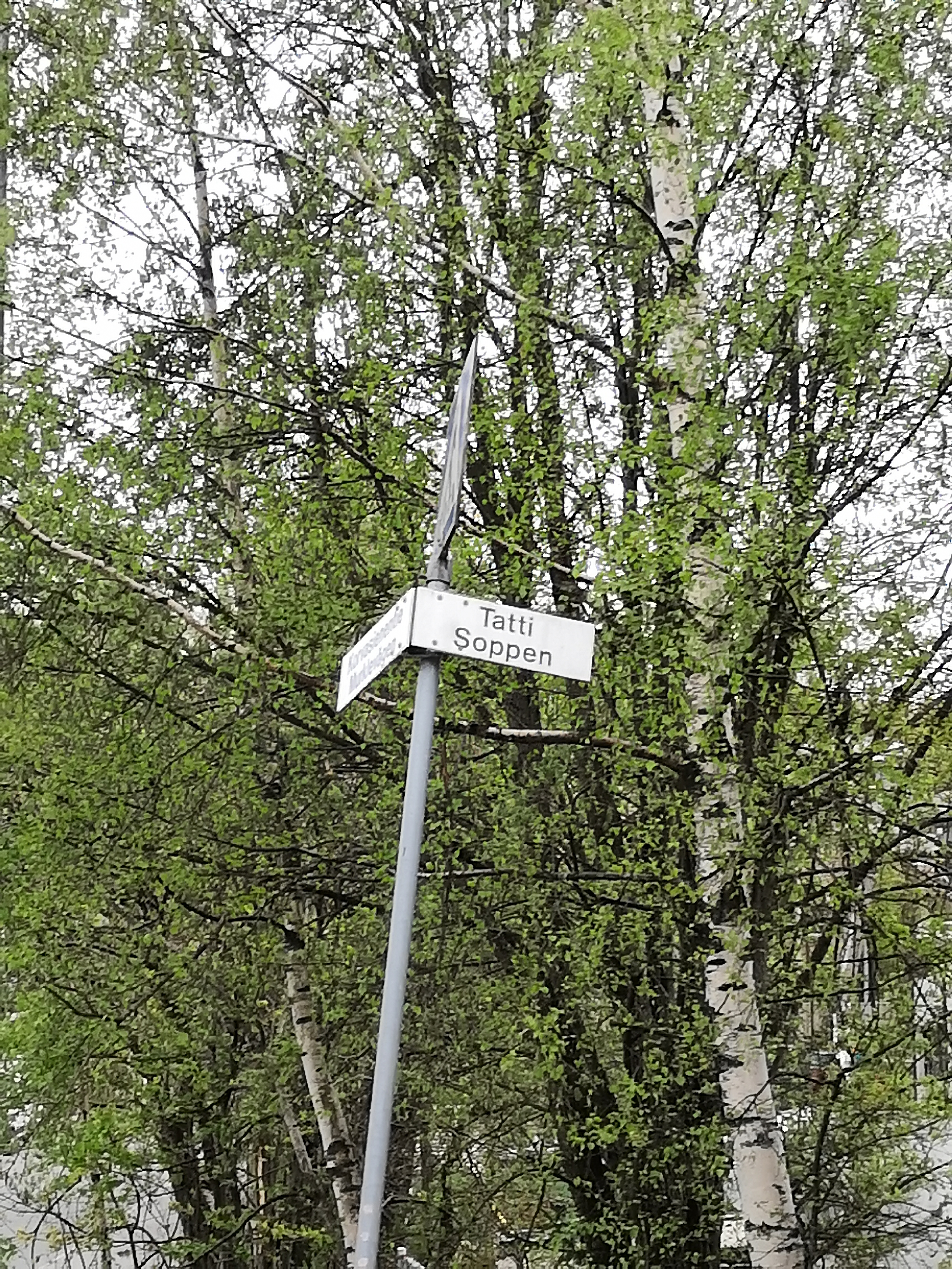 Tatti, katu Helsingissä